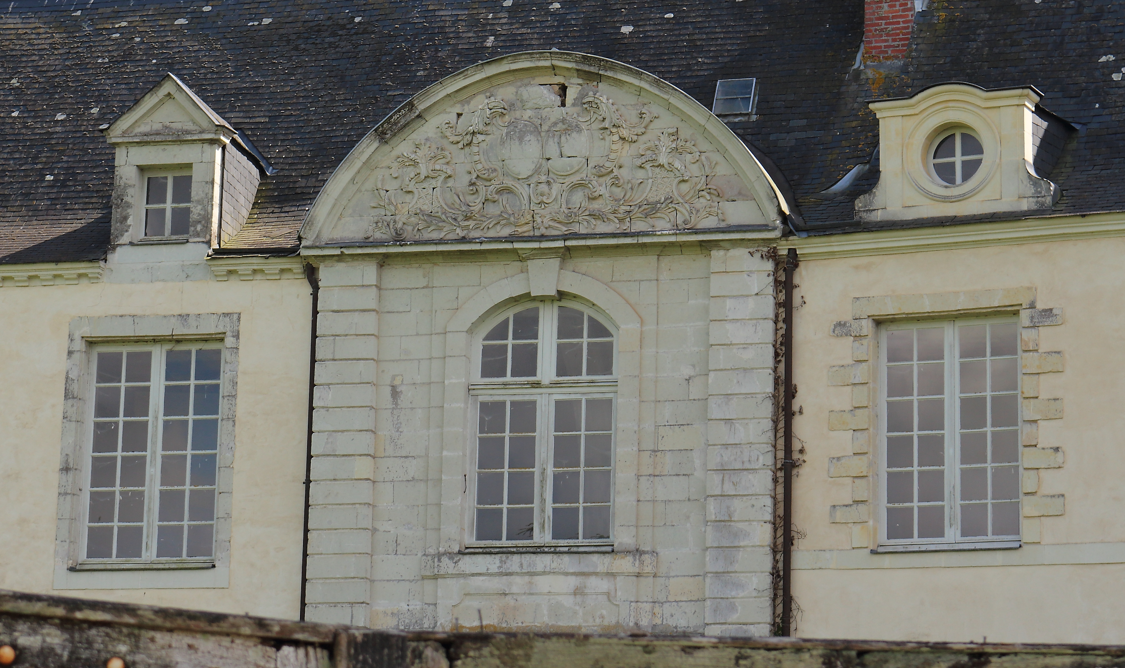 Détail de la façade principale du château de la Cour à Ampoigné, Mayenne, Pays-de-la-Loire, France.